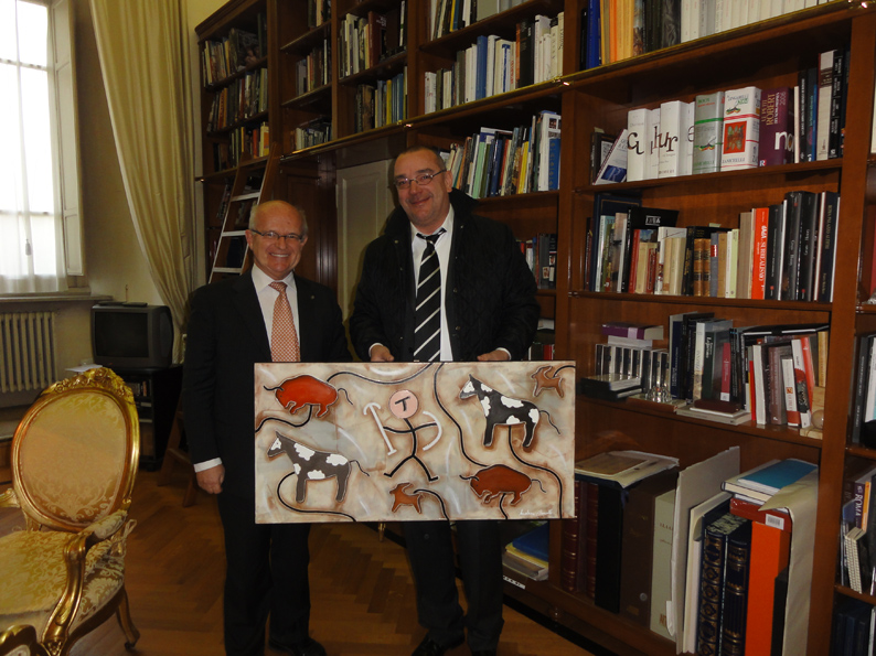 Nello studio del Quirinale del professor Louis Godart, Andrea Benetti consegna l'opera intitolata "Caccia VII", per l'acquisizione nella Collezione d'Arte del Quirinale.